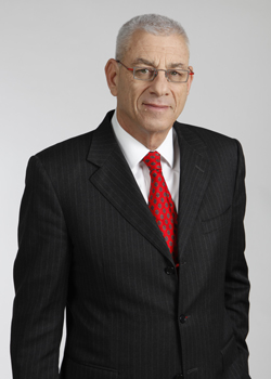 נחום פינברג הוא עורך דין ישראלי